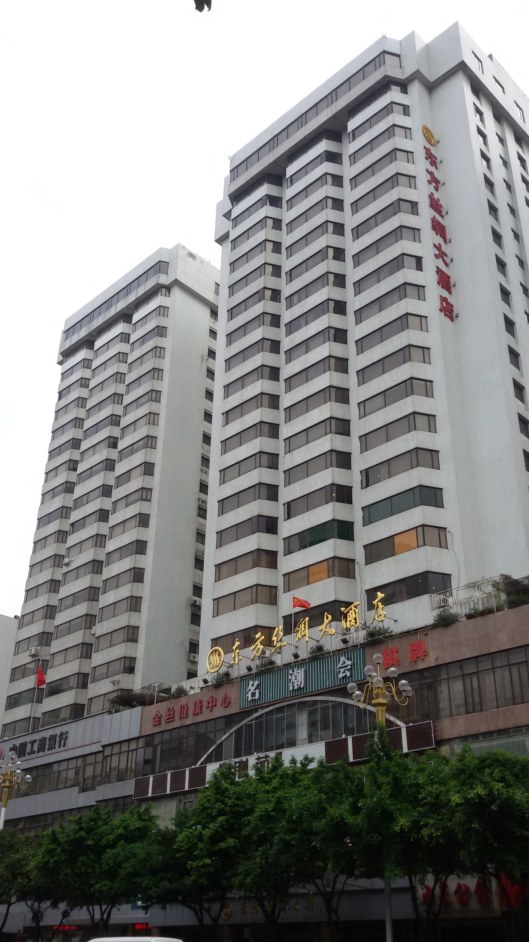 粵語: 東方絲綢大酒店